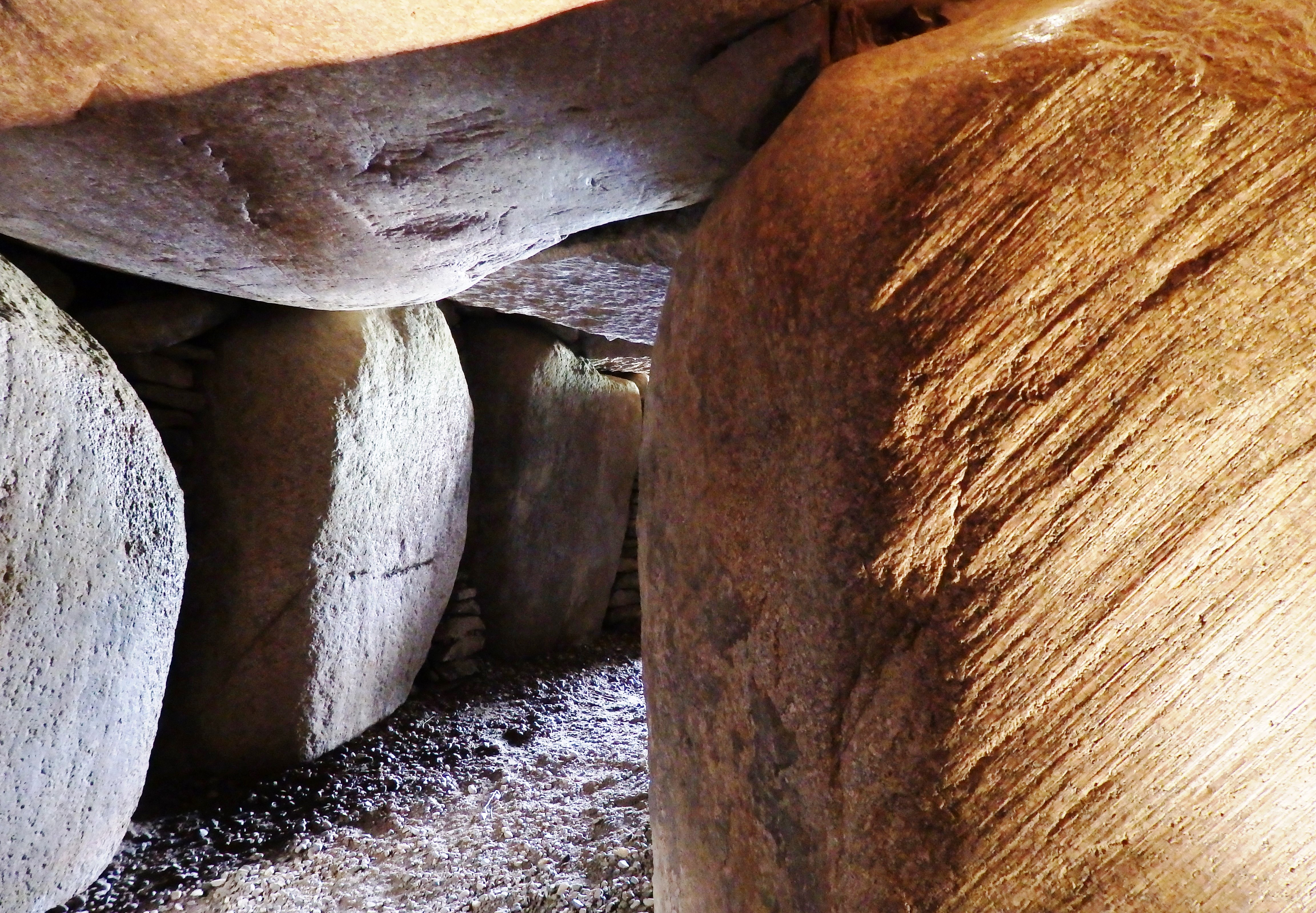 Denghoog innen, rechter Stein mit diagonalen Riefen